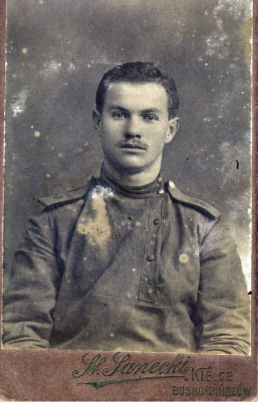 Stanisław Korczak prawdopodobnie w czasie służby w rosyjskim 85 pułku wyborskim w 1915 roku.